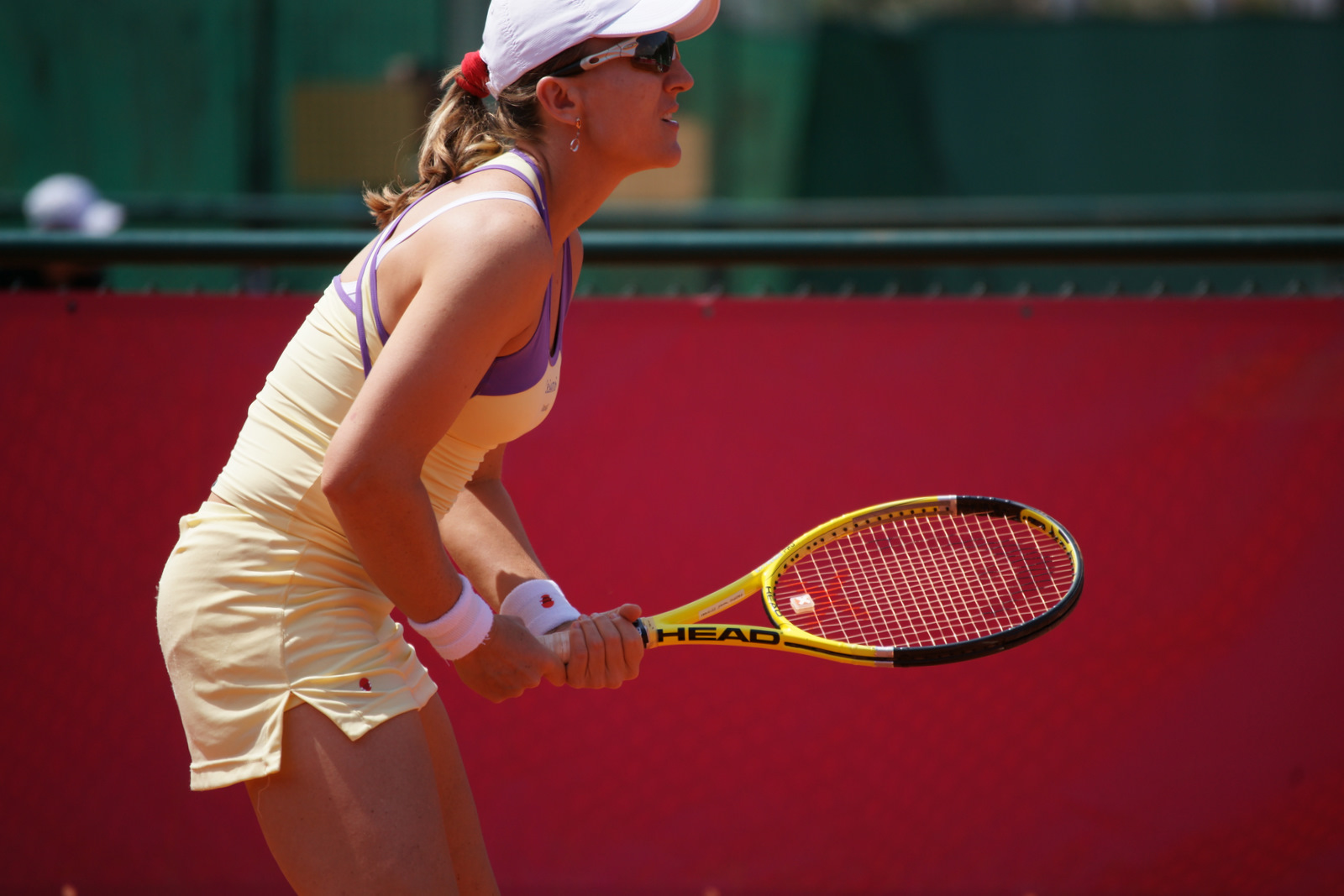 Catalina Castaño, Open tennis, Cagnes-sur-Mer, 2011